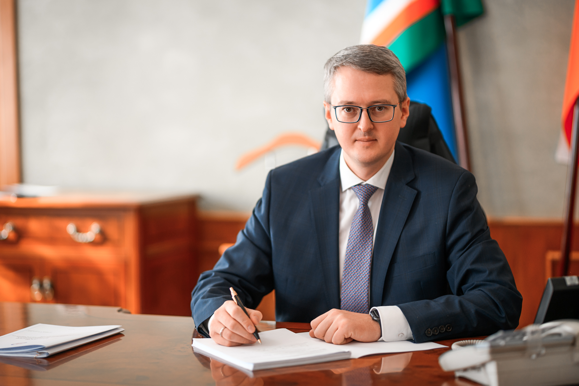 Солодов Владимир Викторович 2019 год